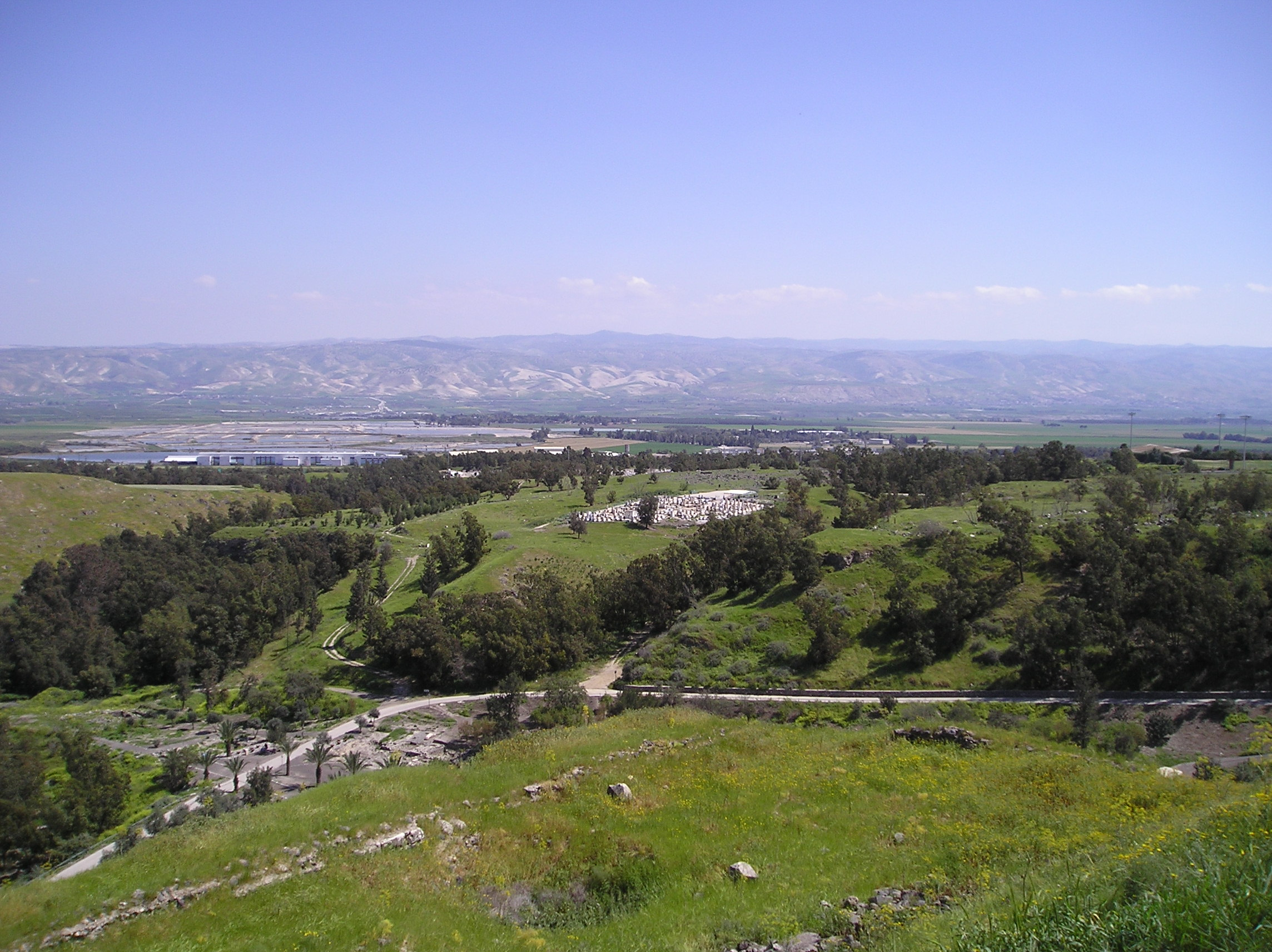 Bet Szean (stanowisko archeologiczne - Scytopolis) w Izraelu. Panorama gór po stronie Królestwa Jordanii z Tell El-Husn.